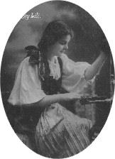 Berky Lili magyar színésznő